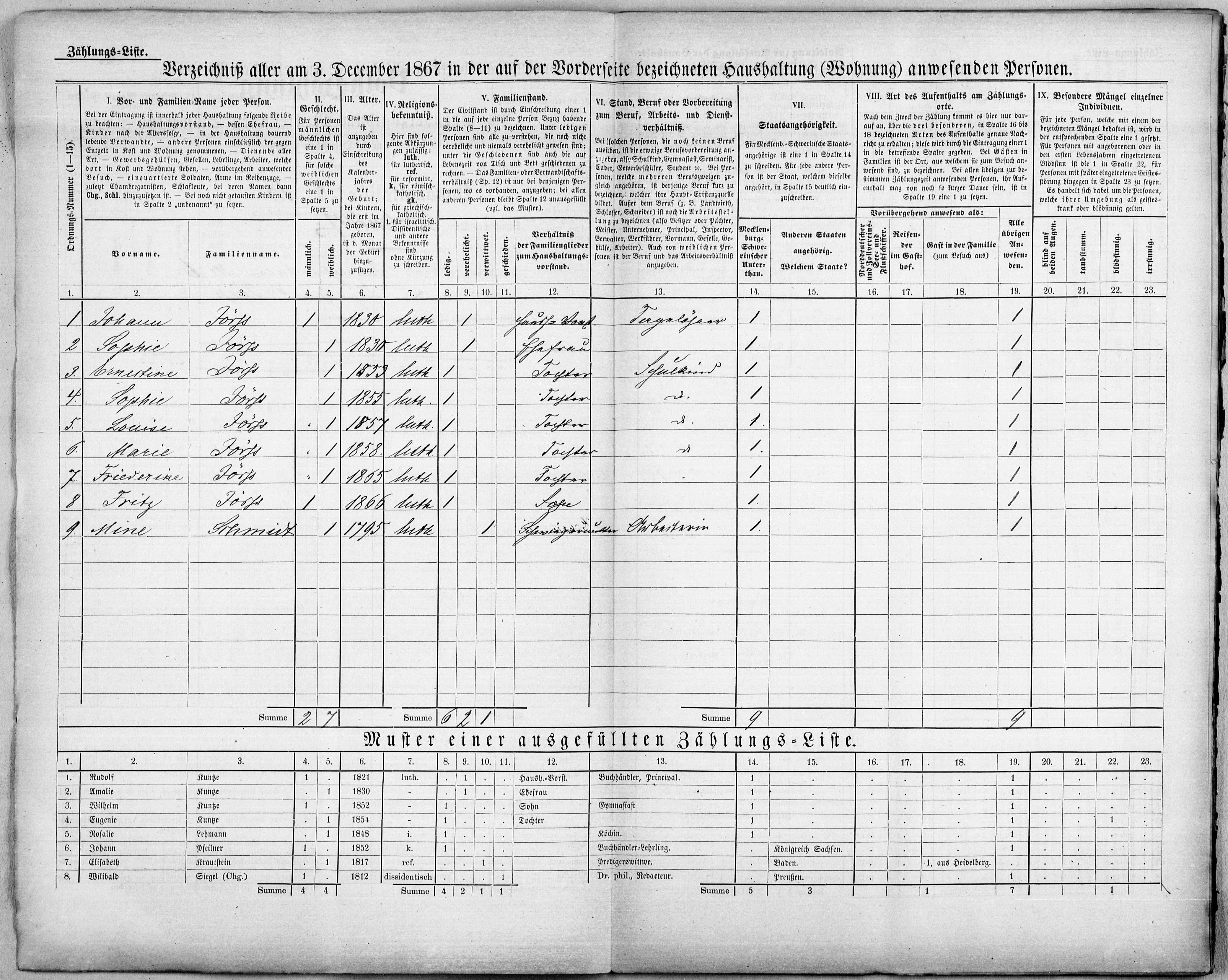 Volkszählung Mecklenburg-Schwerin 3. Dezember 1867: Zählort Levkendorf. Zählkarte mit allen am 3. Dezember 1867 für den Haushalt Jörß in der Tagelöhnerkate Nr. 6 angetroffenen Bewohnern. Als da sind: Johann Jörß, geboren 1831 (korrigierte Ziffer), Haushaltsvorstand, Tagelöhner Sophie Jörß, geboren (geb. Lindemann) 1830 (richtiges Geburtsjahr: 1831), seine Ehefrau Ernestine Jörß, geboren 1853, Tochter, Schulkind Sophie Jörß, geboren 1855, Tochter, Schulkind Louise Jörß, geboren 1857, Tochter, Schulkind Marie Jörß, geboren 1858, Tochter, Schulkind Friederike Jörß, geboren 1865, Tochter Fritz Jörß, geboren 1866, Sohn Mine Schmidt, geboren 1795, Schwiegermutter, Arbeiterin Der vollständige Name von Johann Jörß, geboren am 24 September 1831 in Levkendorf, ist Johann Joachim Friedrich Jörß. Der vollständige Geburtsname von Sophie Jörß, geboren am 12 Juli 1831 in Bredentin, ist Sophia Henriette Christiana Lindemann. Der vollständige Geburtsname von Mine Schmidt, geboren 1795, ist Maria Dorothea Schmidt. Sie war verheiratet mit Johann Lindemann. Sophia Henriette Christiana Lindemann ist ihre Tochter. Die am 4. September 1855 geborene Sophia Caroline Wilhelmine Jörß heiratet 1880 den Wilhelm Carl Friedrich Gräber. In der Heiratsurkunde von 1880 wird folgendes zu Sophia erwähnt: „Tochter des Tagelöhners Johann Jörß und dessen Ehefrau Sophia geb. Lindemann, wohnhaft zu Levkendorf“.